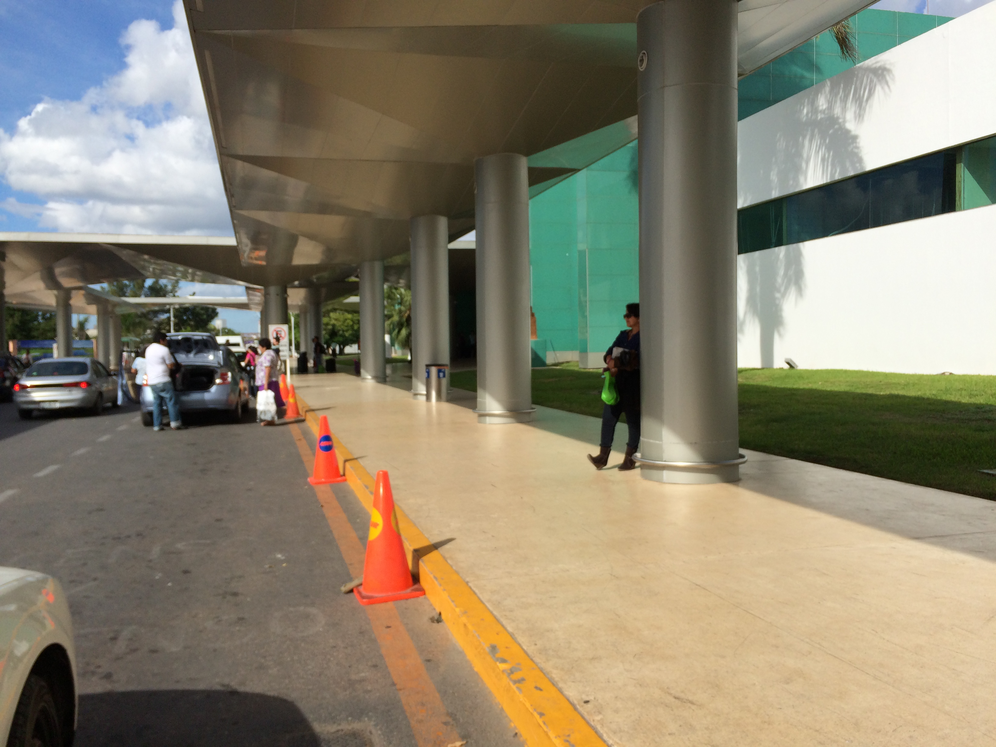 Zona de salidas del Aeropuerto de Mérida.